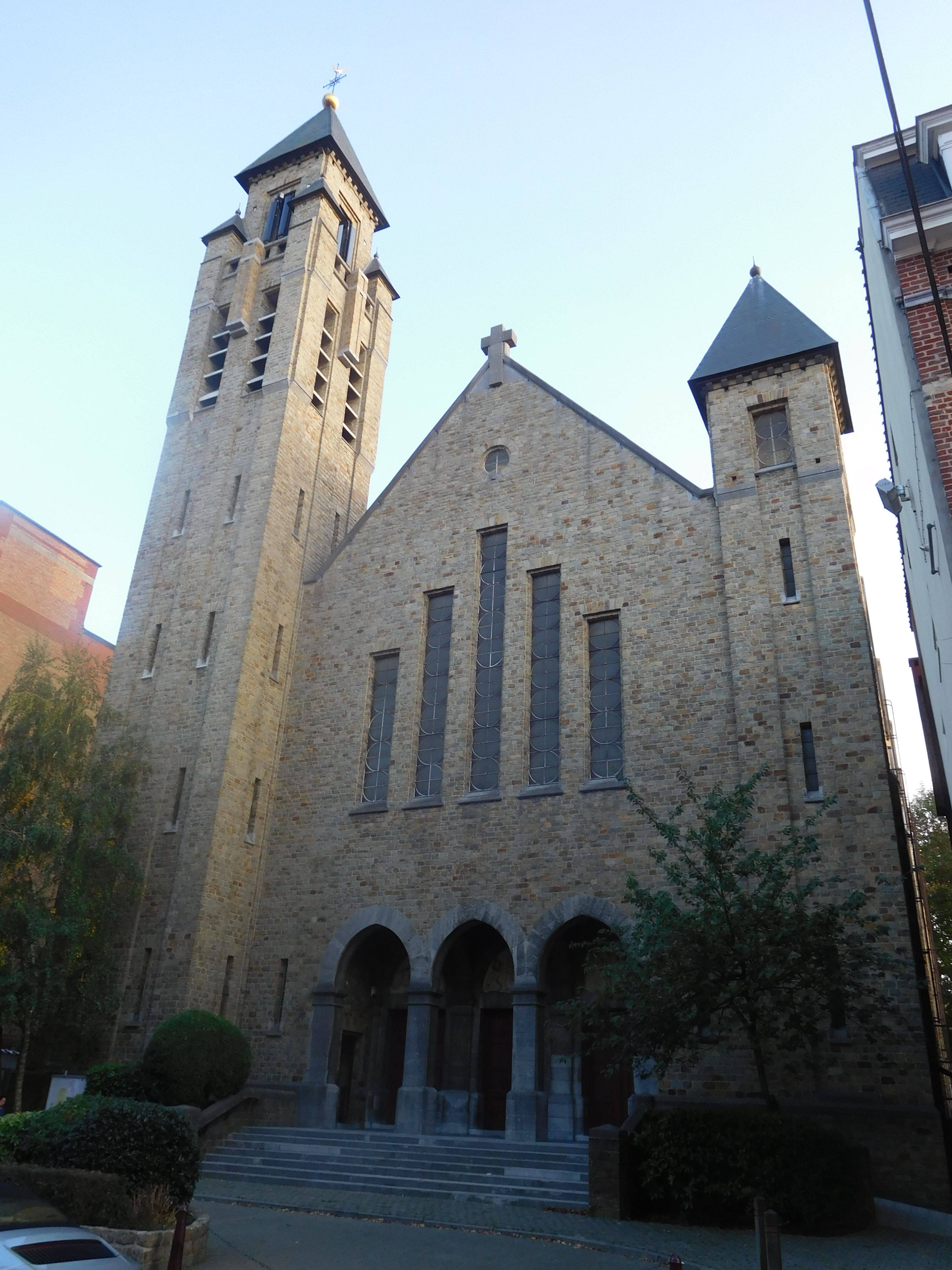 L'église Notre-Dame du Rosaire se trouve rue Montjoie, à Uccle, commune de la ville de Bruxelles